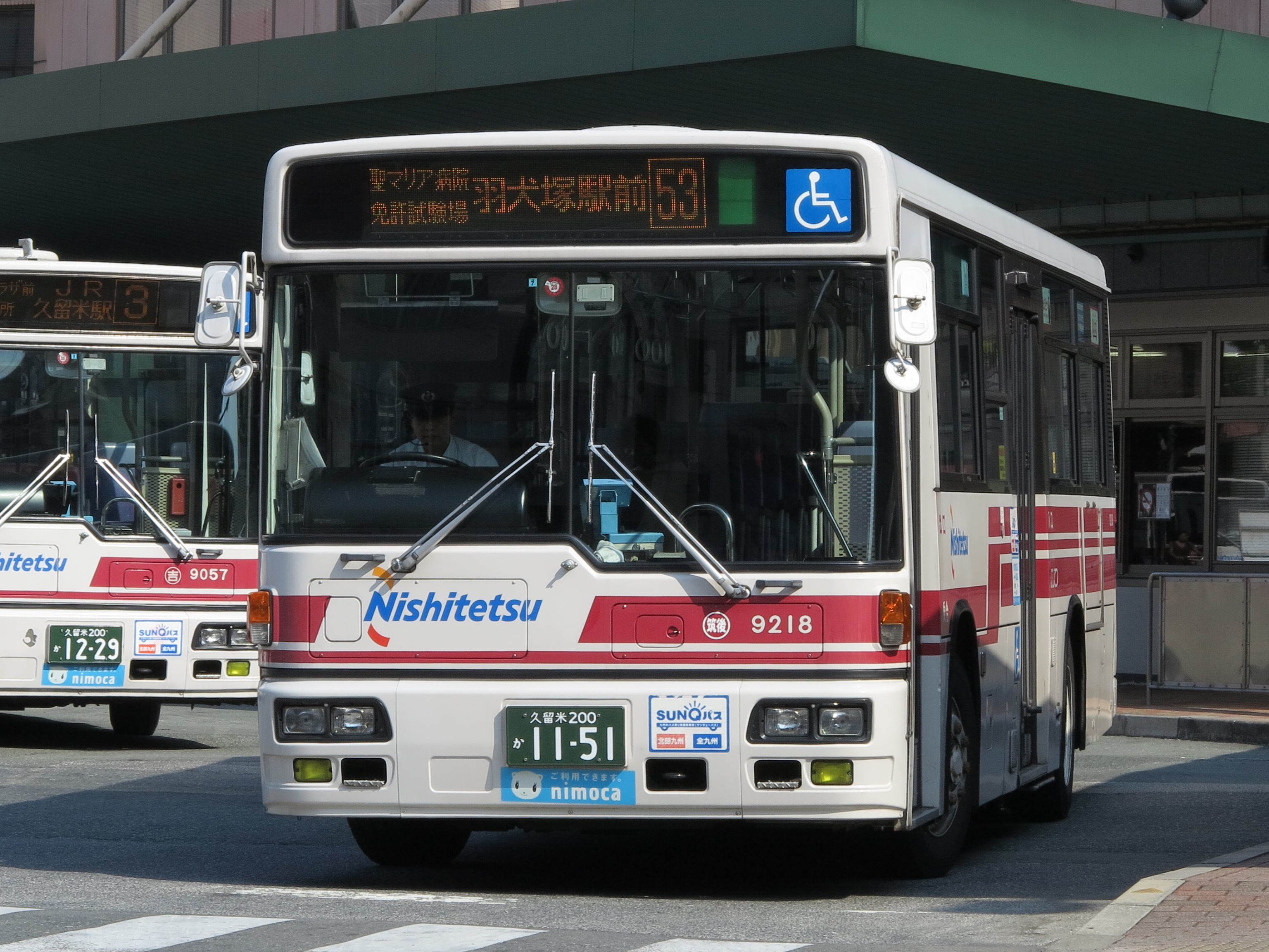 西鉄バス久留米・筑後車庫所属 日デ2005年式（KL-UA452MAN）